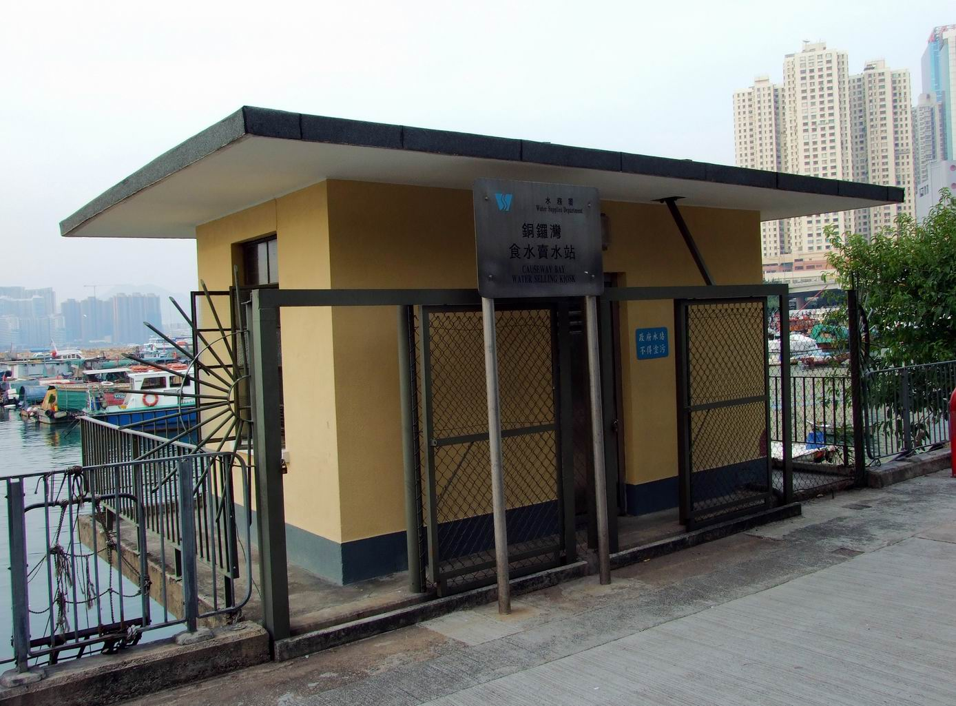 水務署銅鑼灣食水售賣站